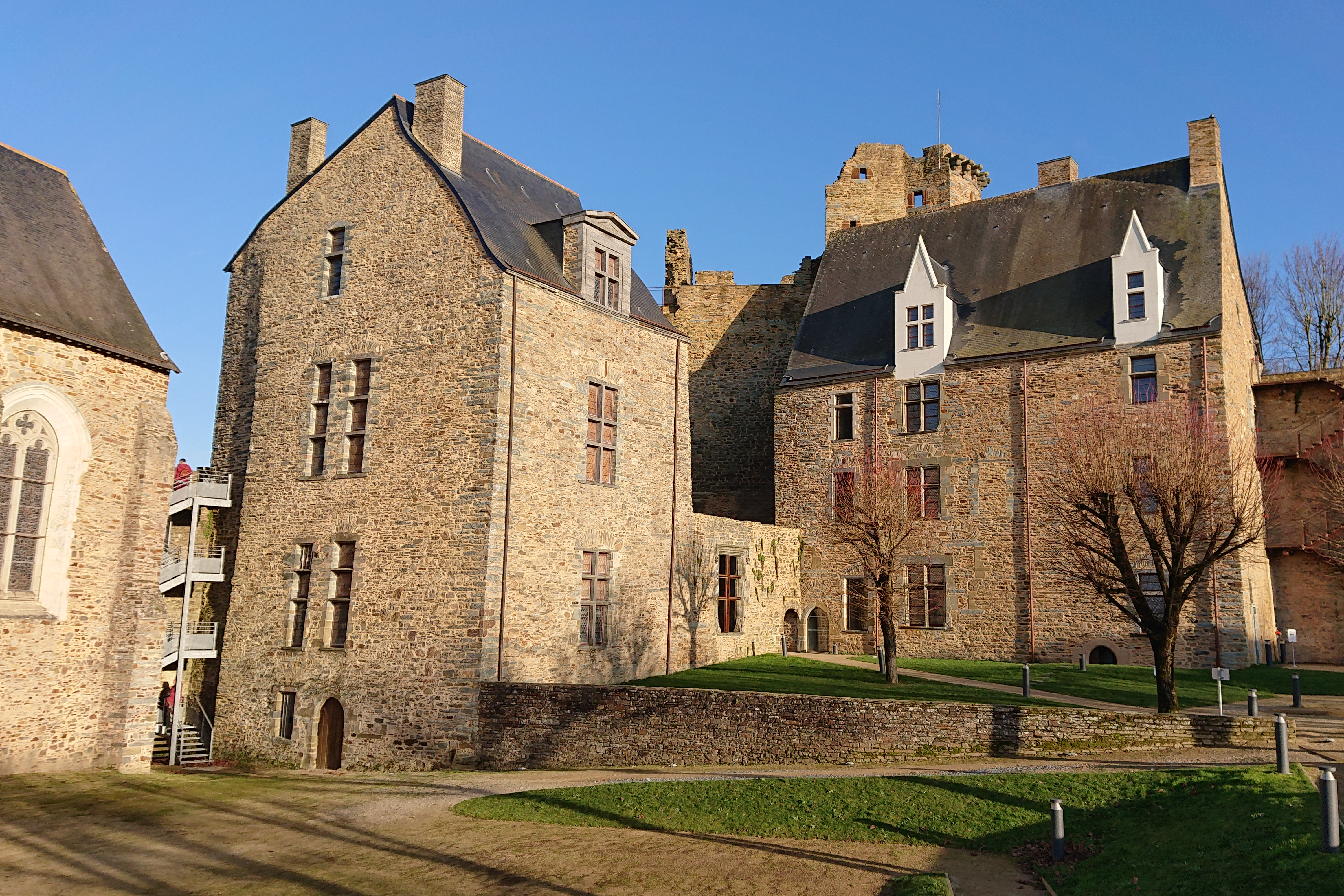 Vue d'ensemble des vieux logis du Château de Châteaubriant, France.